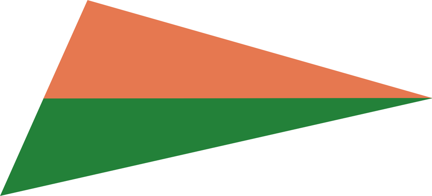 LWP - barwy broni na kołnierze kurtek obowiązujące od stycznia 1945 - artyleria plotnicza